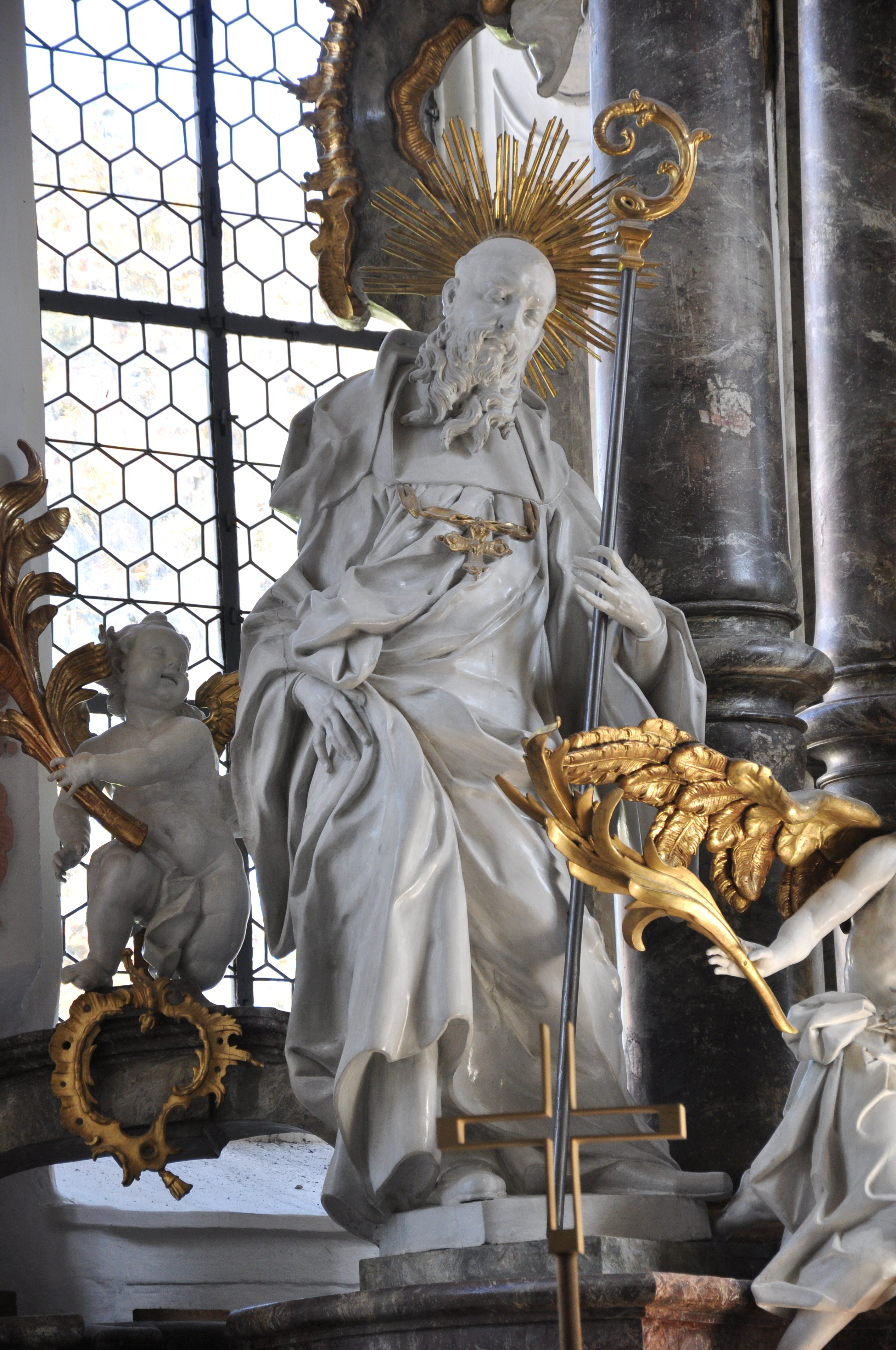 Klosterkirche Wald (Landkreis Sigmaringen), Hochaltar, Statues Hl. Benedikt von Franz Schneider/Sartori